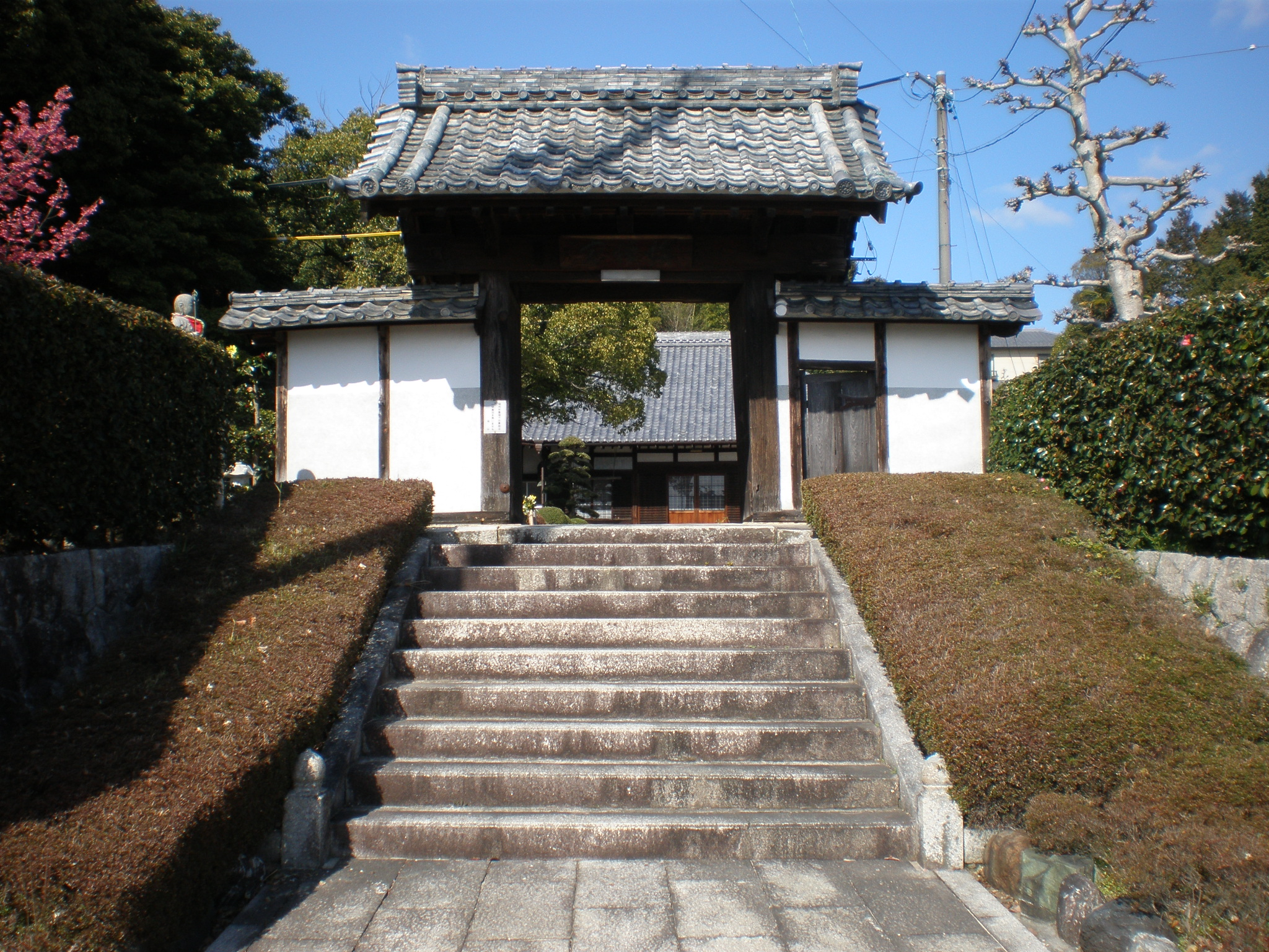 愛知県小牧市にある久保寺の山門